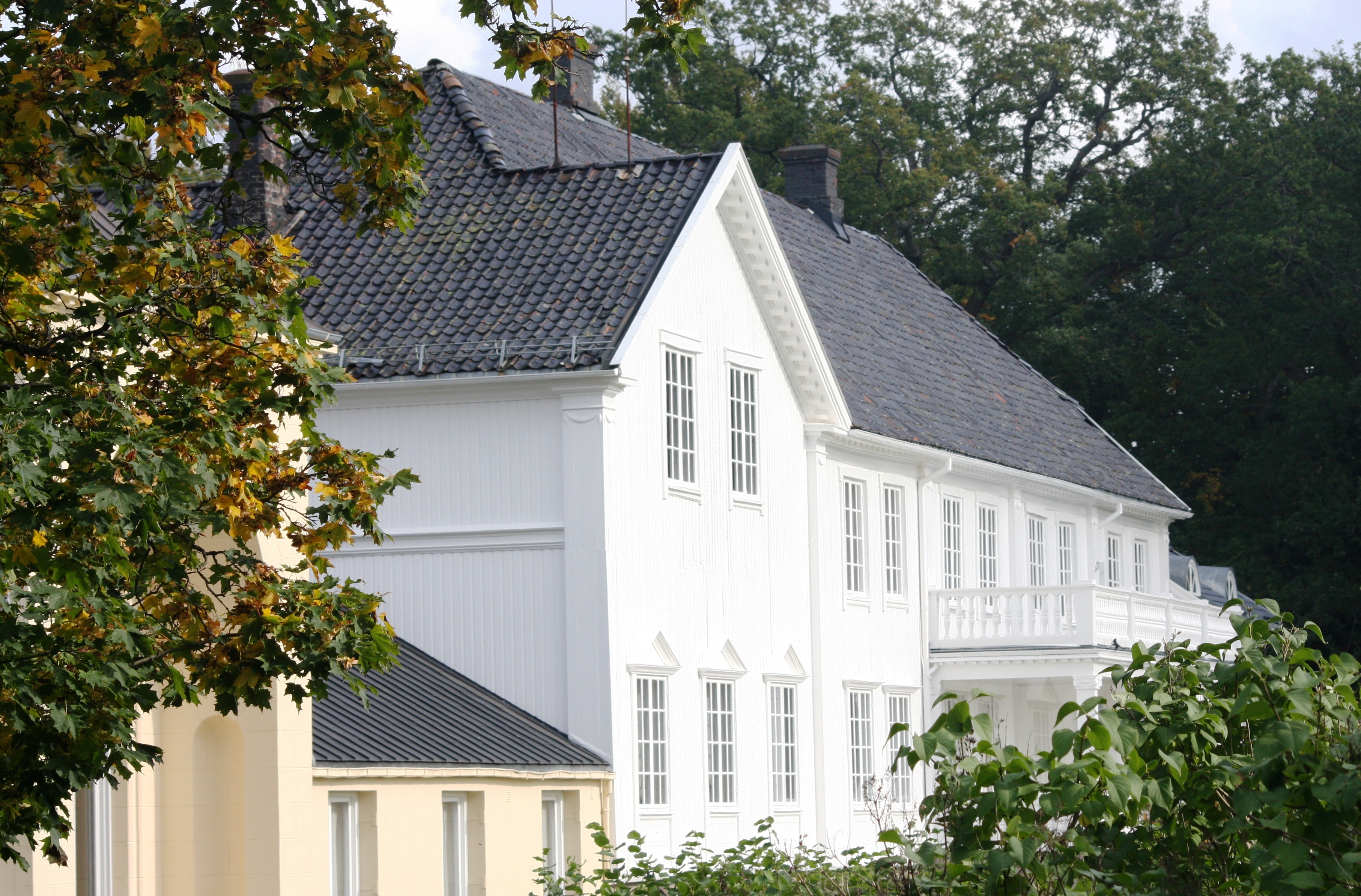 Röd manor in Halden, southeastern Norway. The manor has belonged to several families, and was visited by Thomas Robert Malthus in 1799.